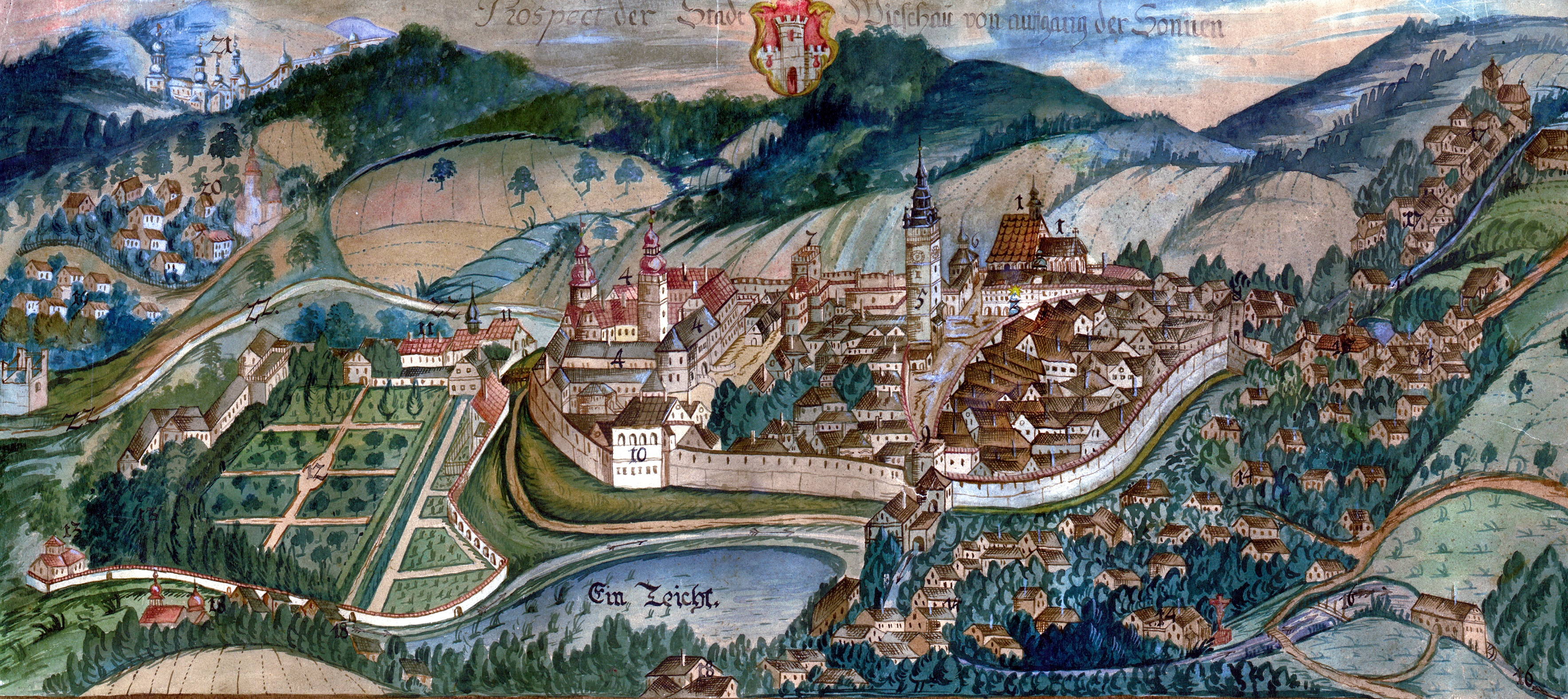 Vyskov_1720 (Vyškov- czech republic)-Fotografie z výročního letáku autor neuveden veřejný zdroj.